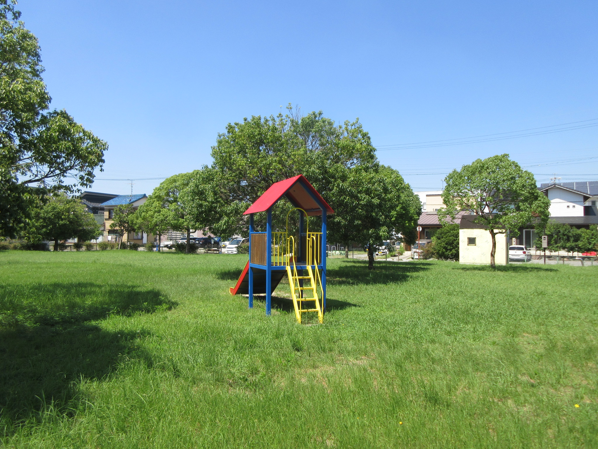 竹ノ花公園（岡崎市柱4丁目）